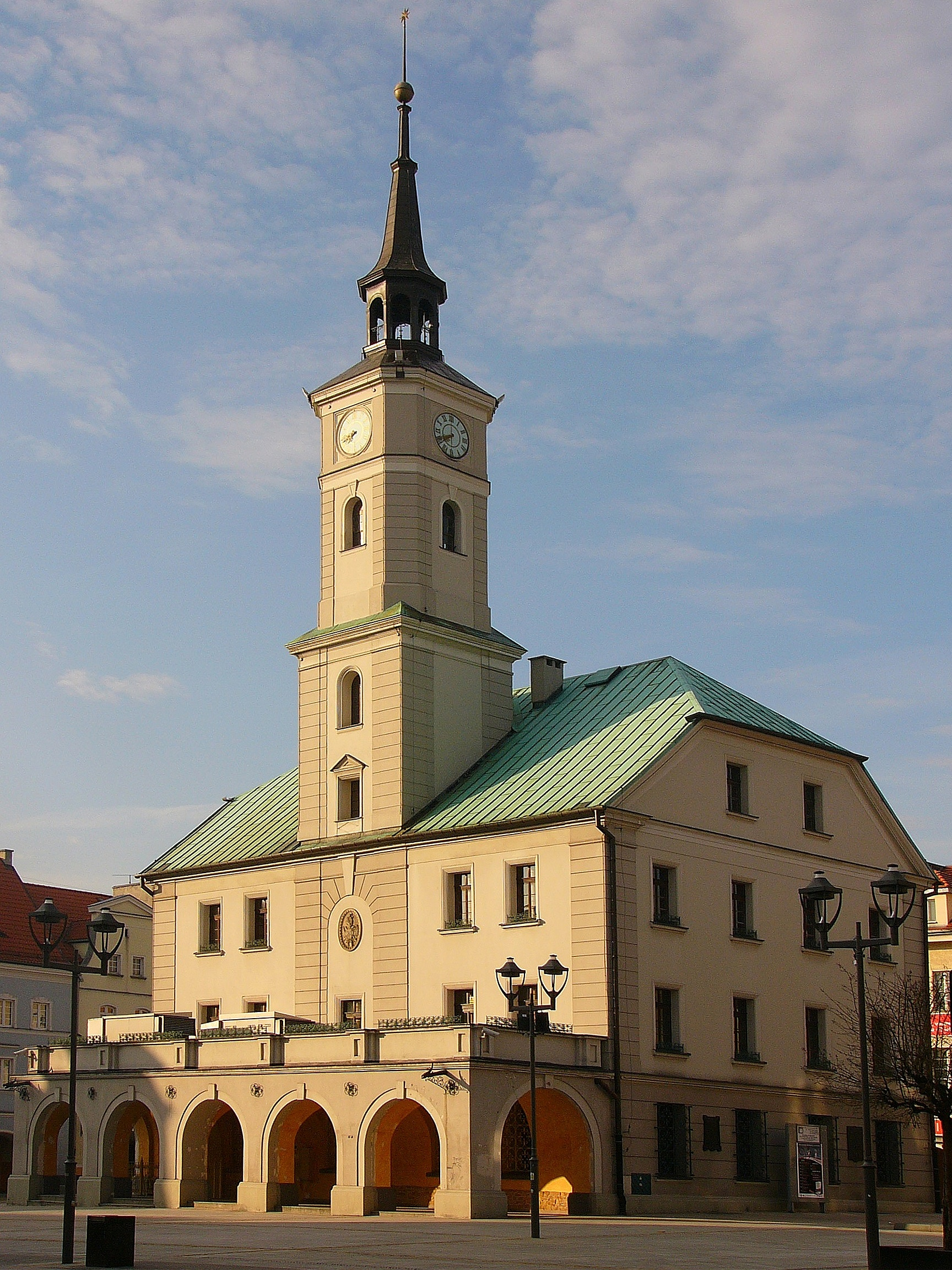 Gliwice - ratusz z XVIII/XIX w. (zabytek nr A/319/60)